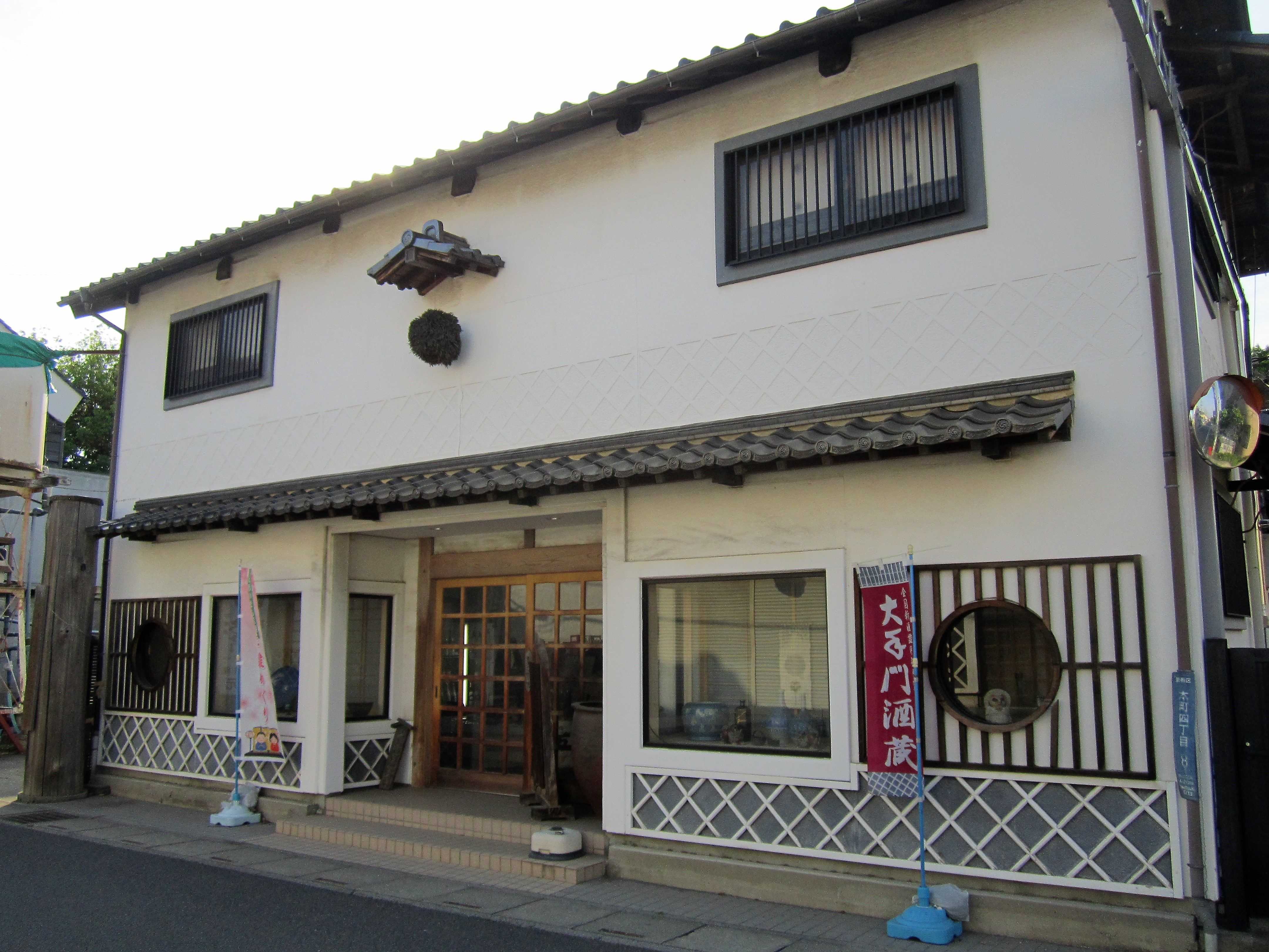 鈴木酒造 酒蔵資料館（さいたま市岩槻区本町）